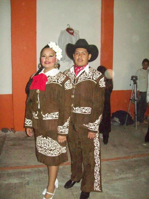 foto ejemplo de cueras tamaulipecas